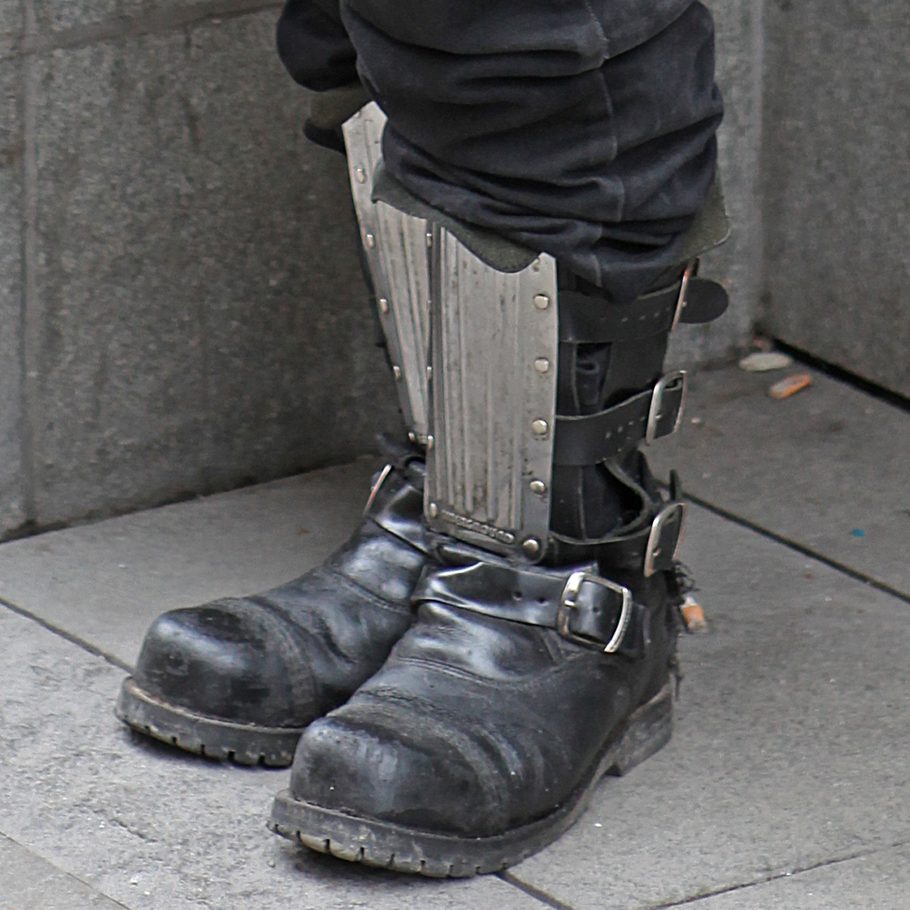 Black boots in Stockholm